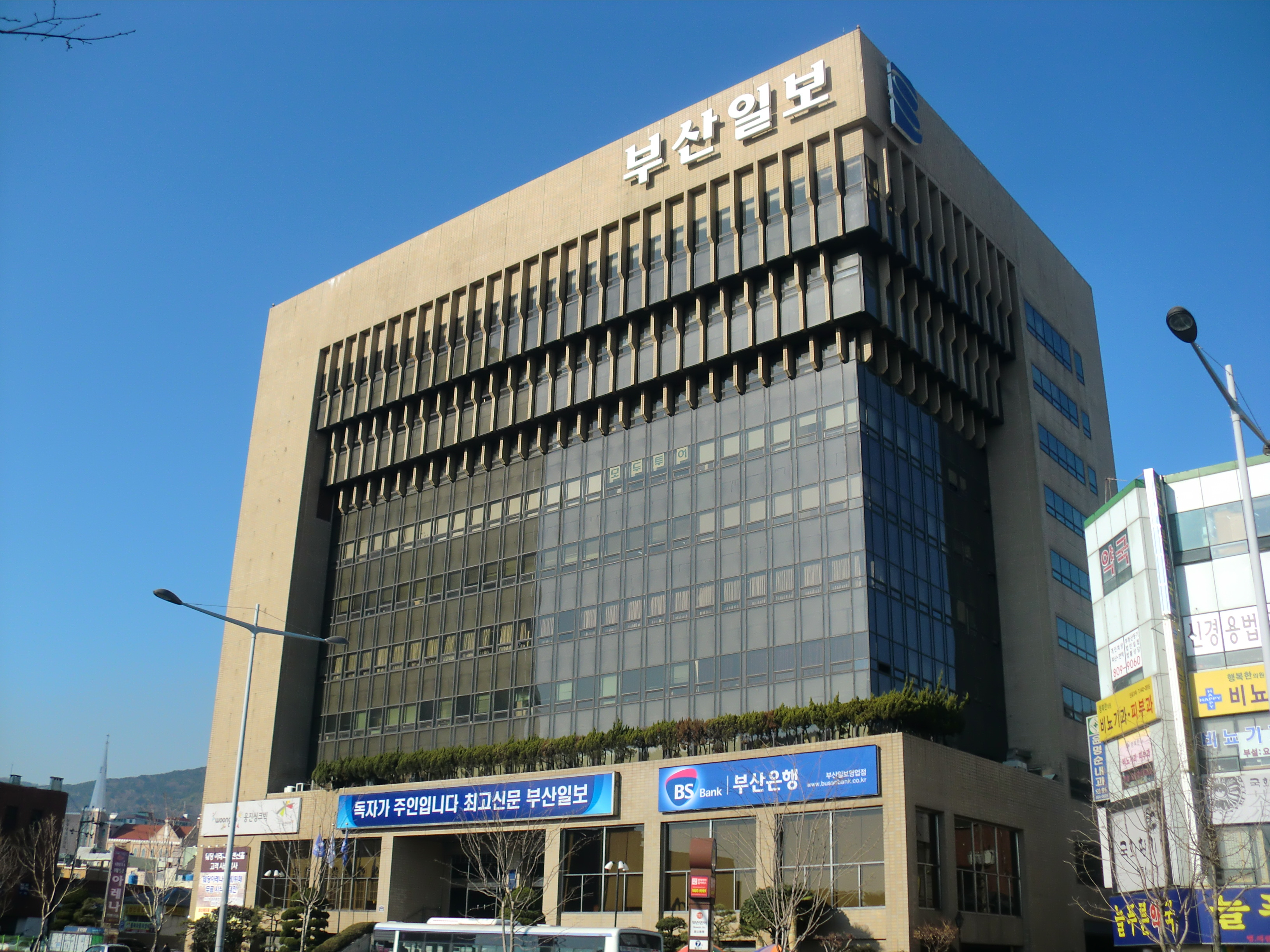 부산광역시 동구에 있는 부산일보 본사